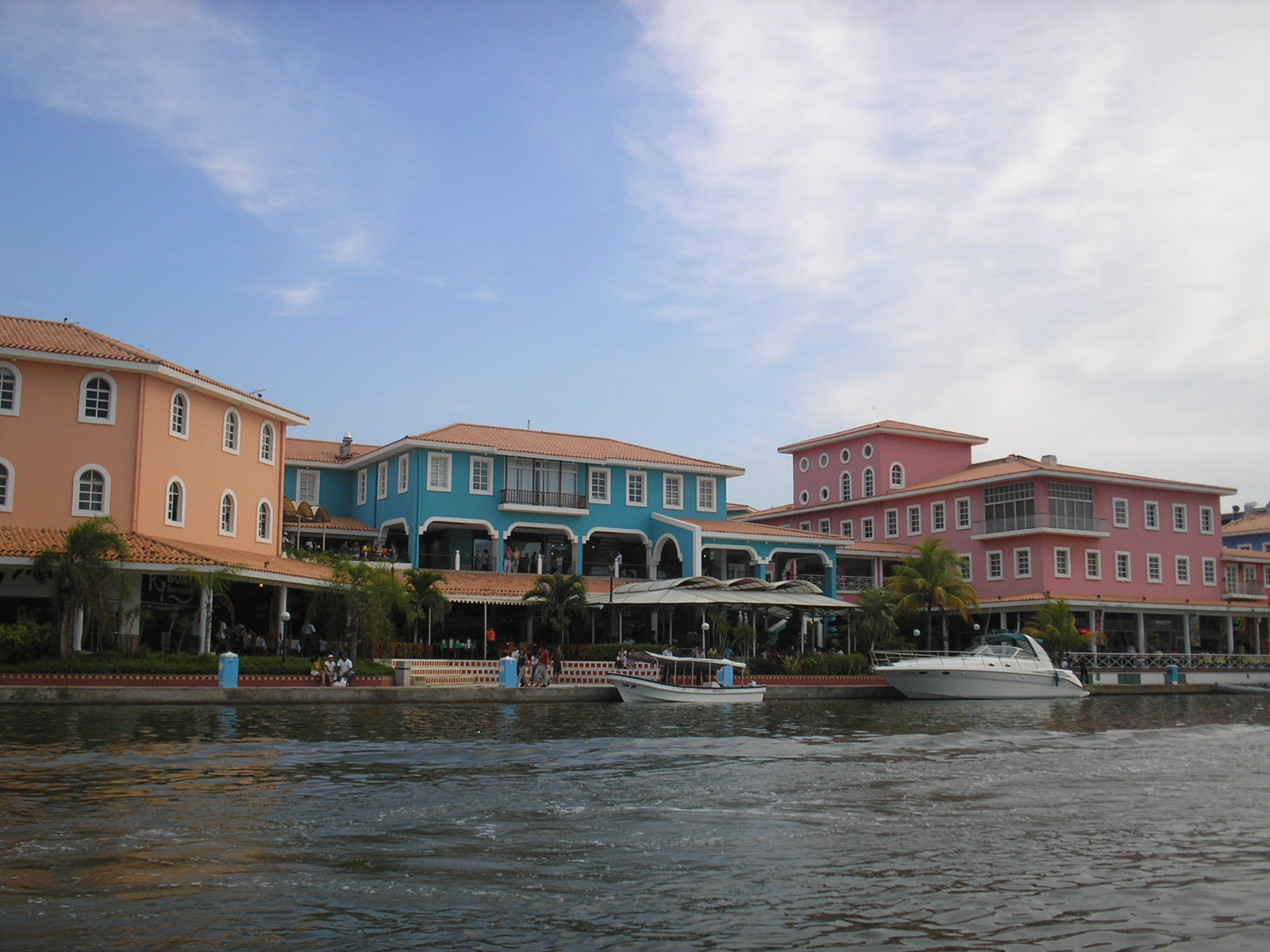 El Centro Comercial Plaza Mayor es uno de los sitios más populares de Lechería, edo. Anzoátegui.